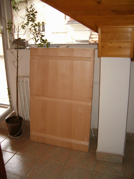 Srpskohrvatski / српскохрватски: Velika daska za ikone